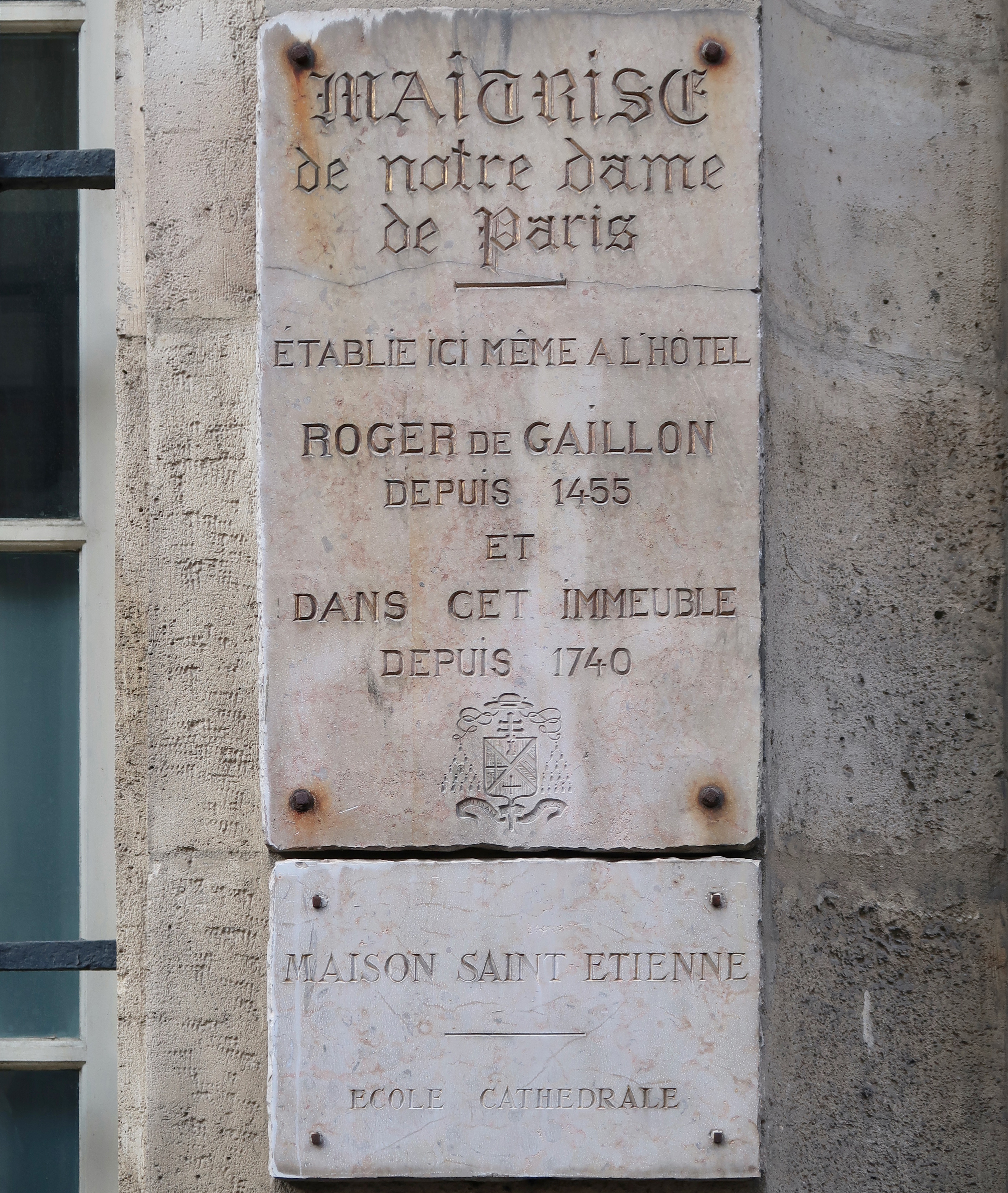 Plaque devant l'hôtel Roger de Gaillon, 8 rue Massillon (Paris, 4e).